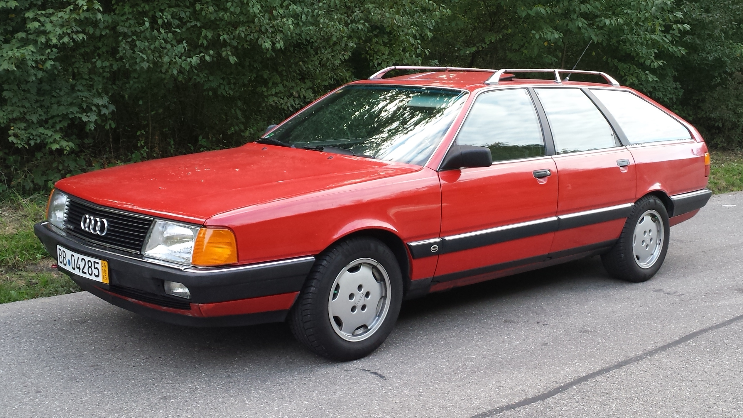 Frontansicht Audi 100 Avant quattro 2.3E Sondermodell "Sport" (S 711) Modelljahr 1990